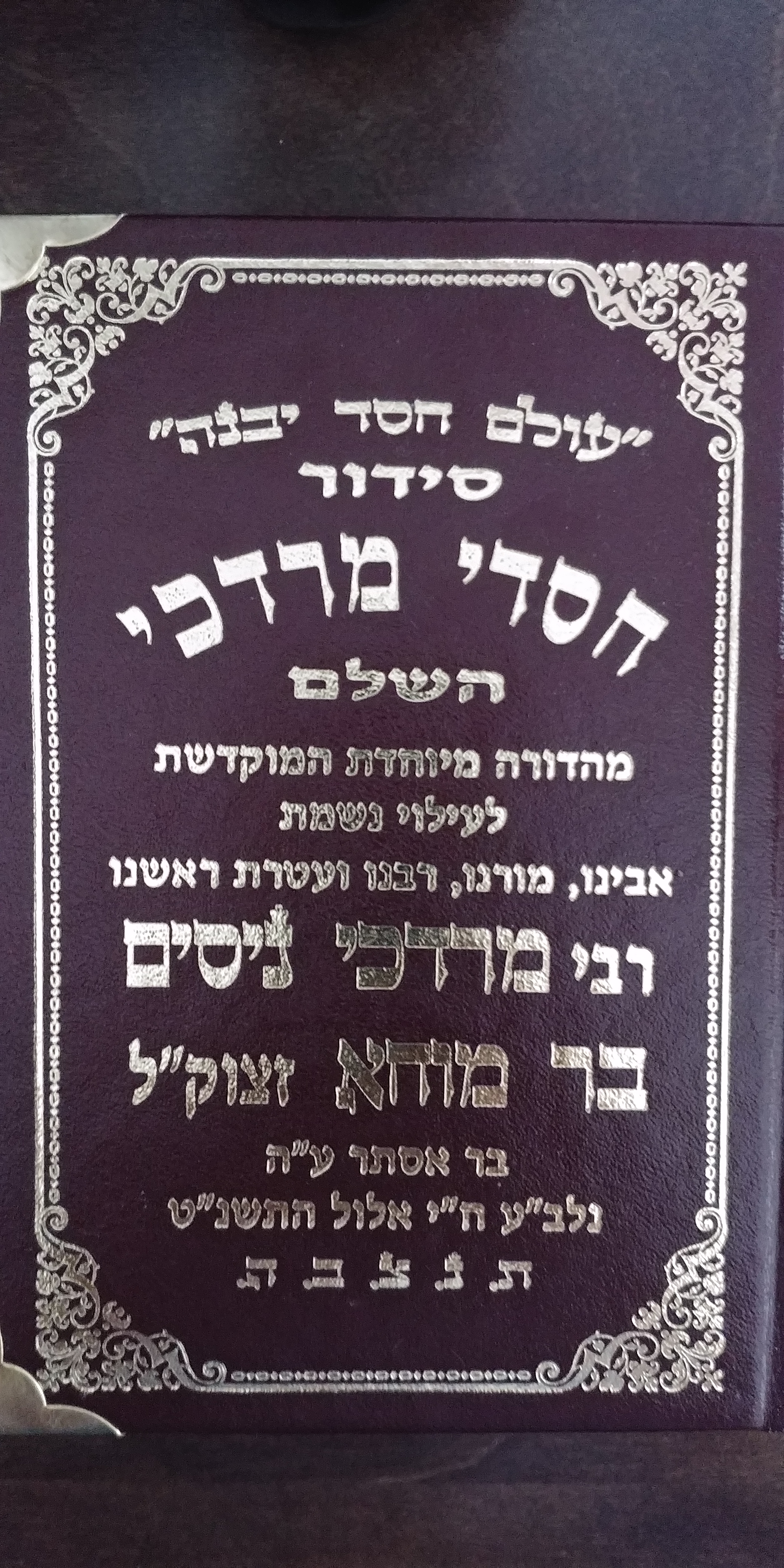 סידור שנכתב לעלוי נשמת הרב ע"י בנו יקותיאל בר מוחא